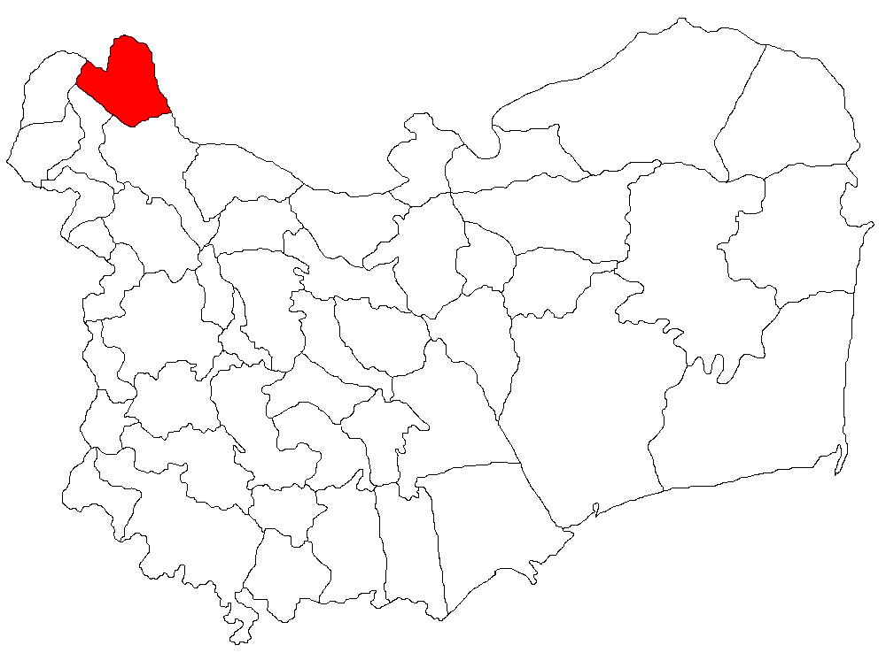 Categorie:Hărţi ale judeţului Tulcea